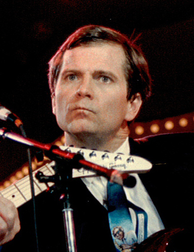 Lee Atwater in 1989